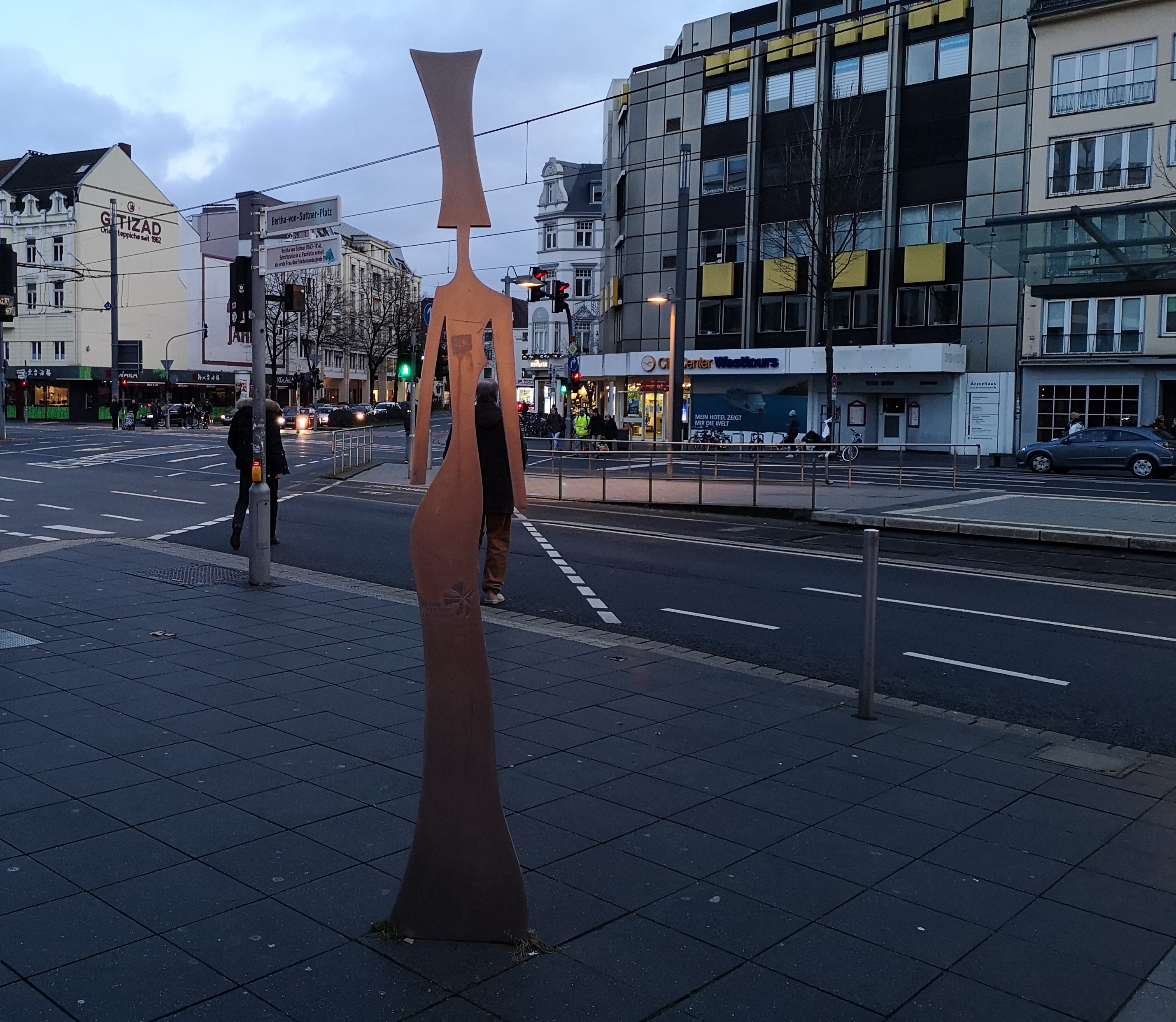 Denkmal am Bertha-von-Suttner Platz Bonn der Friedenskämpferin und Menschenrechtlerin Bertha von Suttner